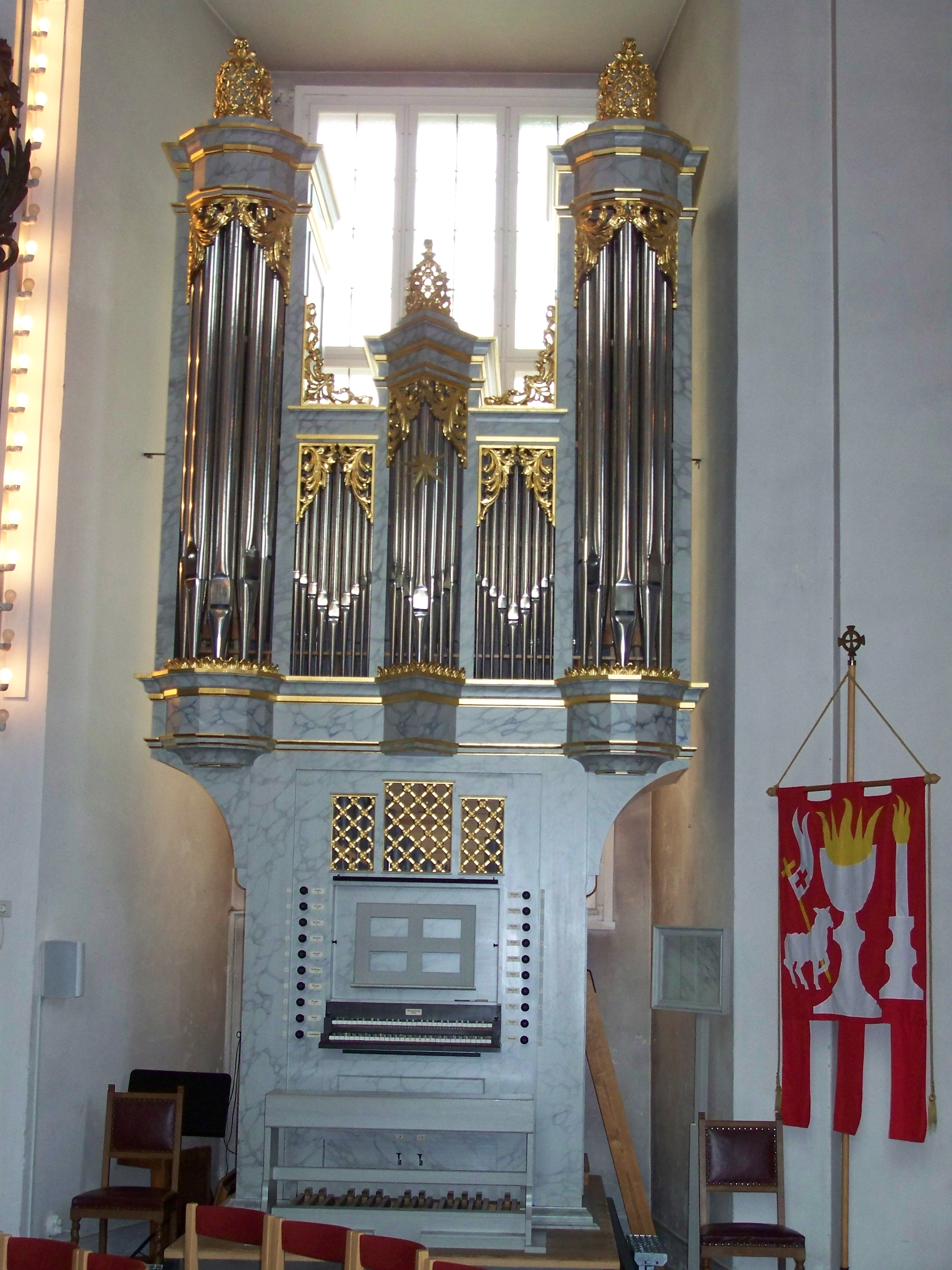 Kalmar,_Dom_Barock-Orgel von 1998_